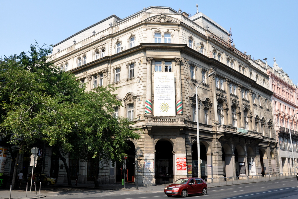 V. kerület, Nemzeti Kaszinó és középkori településfal This is a photo of a monument in Hungary. Identifier: 601